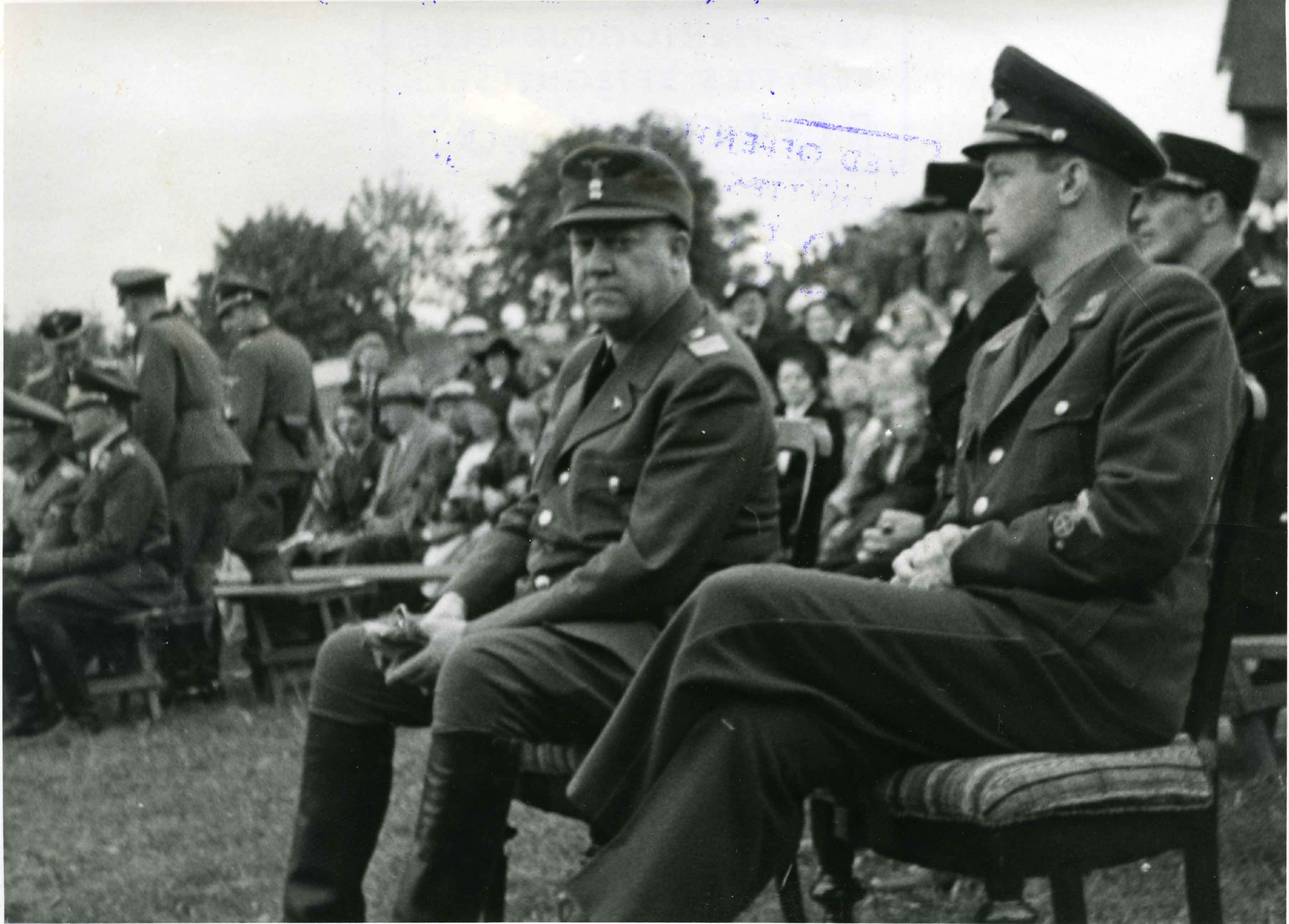 Jonsokstevne 1943 på Domkirkeodden, Hamar. Vidkun Quisling og NS fylkesfører i Hedmark Axel Aas. Se også filmopptak i Filmavisen 28. juni 1943 : «3. Hamar: Jonsokstevne for Hedmark og Oppland Fylkesorganisasjon av NS» Fotograf: NSUF Nasjonal Samling, forkortet NS, var et norsk politisk parti som ble grunnlagt av Vidkun Quisling i 1933 og ble oppløst ved frigjøringa i 1945. Partiet la seg etterhvert nært opp mot nasjonalsosialismens ideologi og ble støtteorganisasjon for den tyske okkupasjonsmakta i Norge under andre verdenskrig. RA/PA-0781/Fa/0001/0178 1159